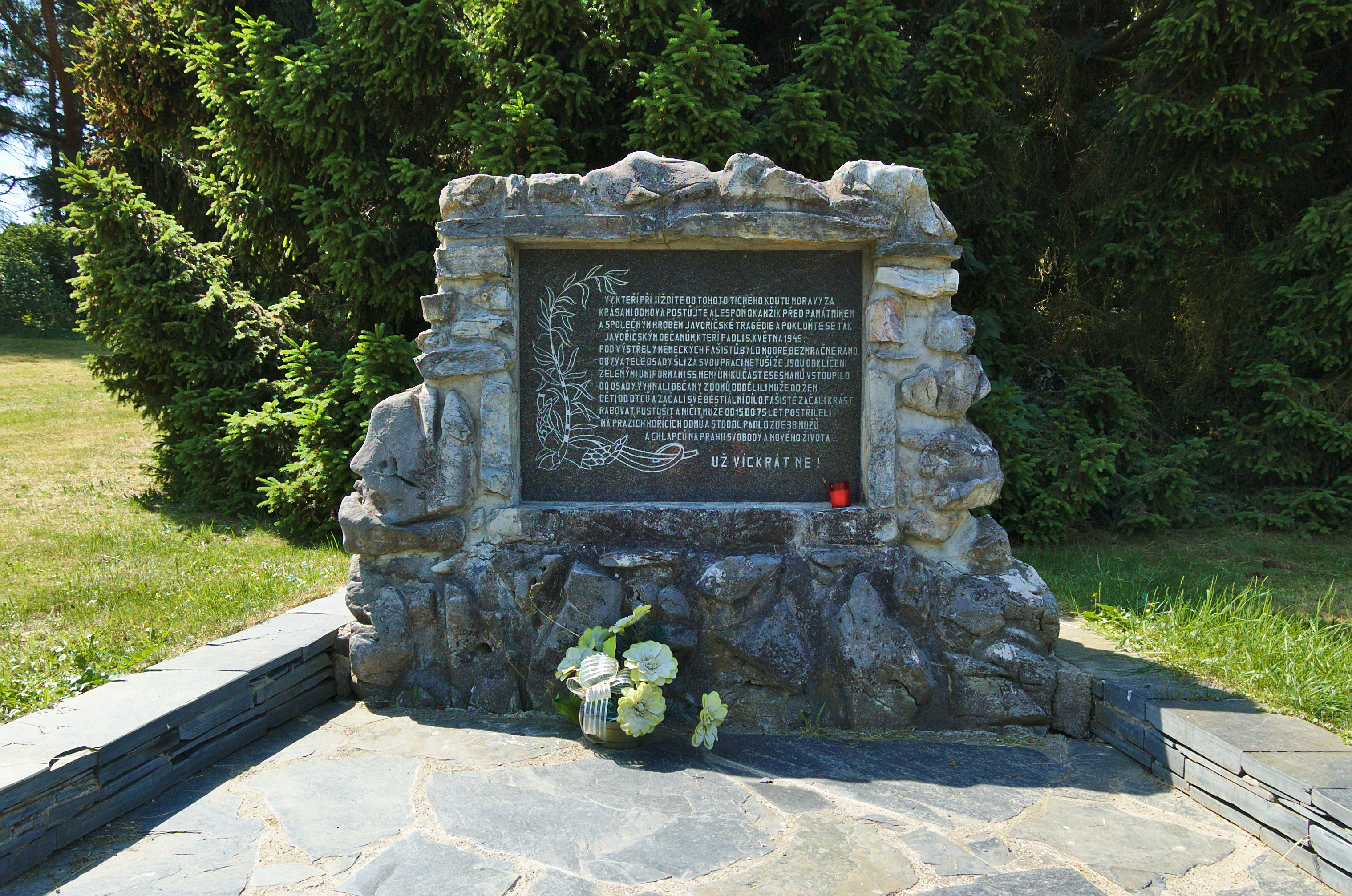 Památník obětem druhé světové války, Javoříčko, Luká, okres Olomouc